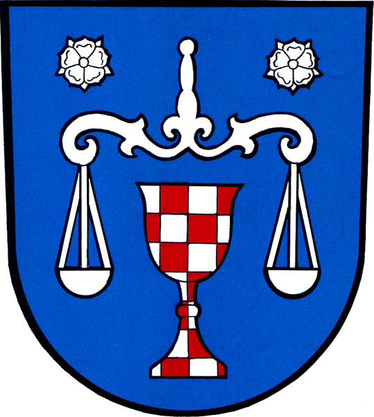 Znak obce Liptaň